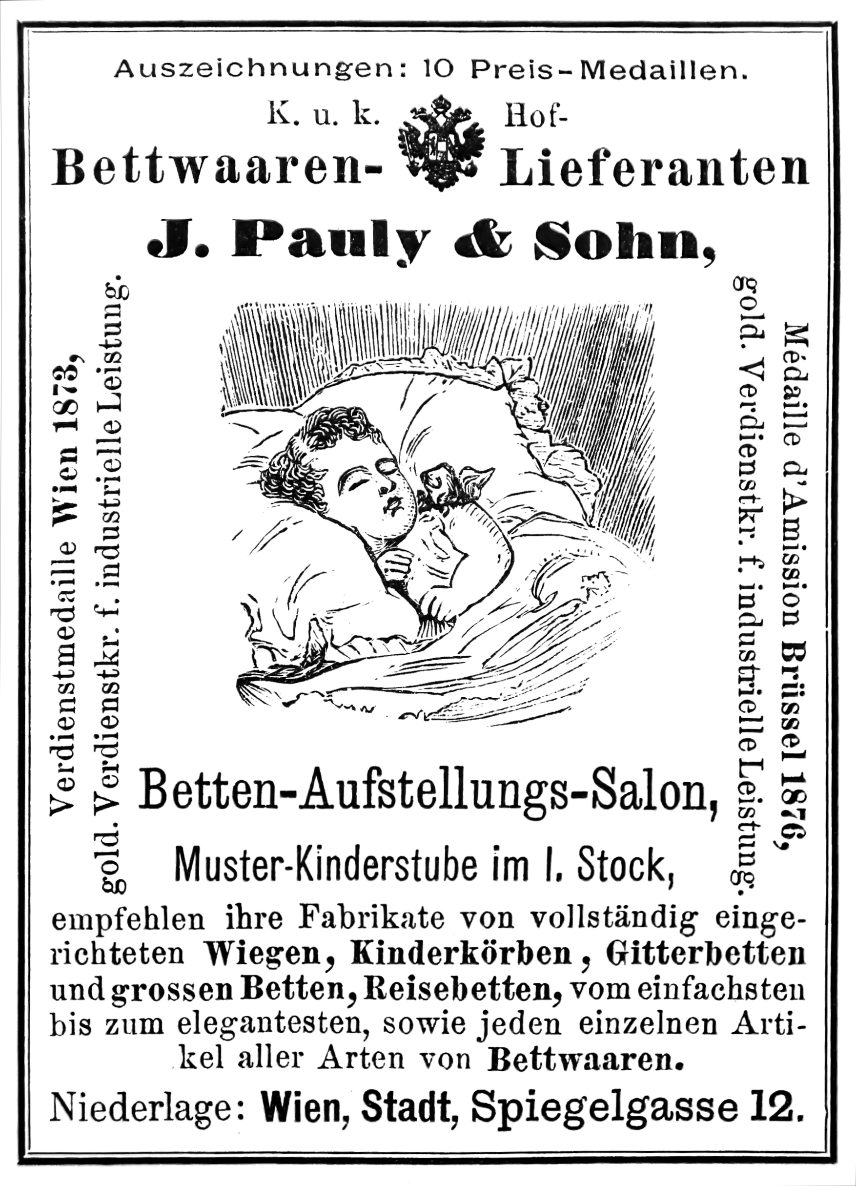 Werbung von J. Pauly & Sohn im Handbuch des Allerhöchsten Hofes und des Hofstaates Seiner K. und K. Apostolischen Majestät für 1891. Licensing thumb|Original